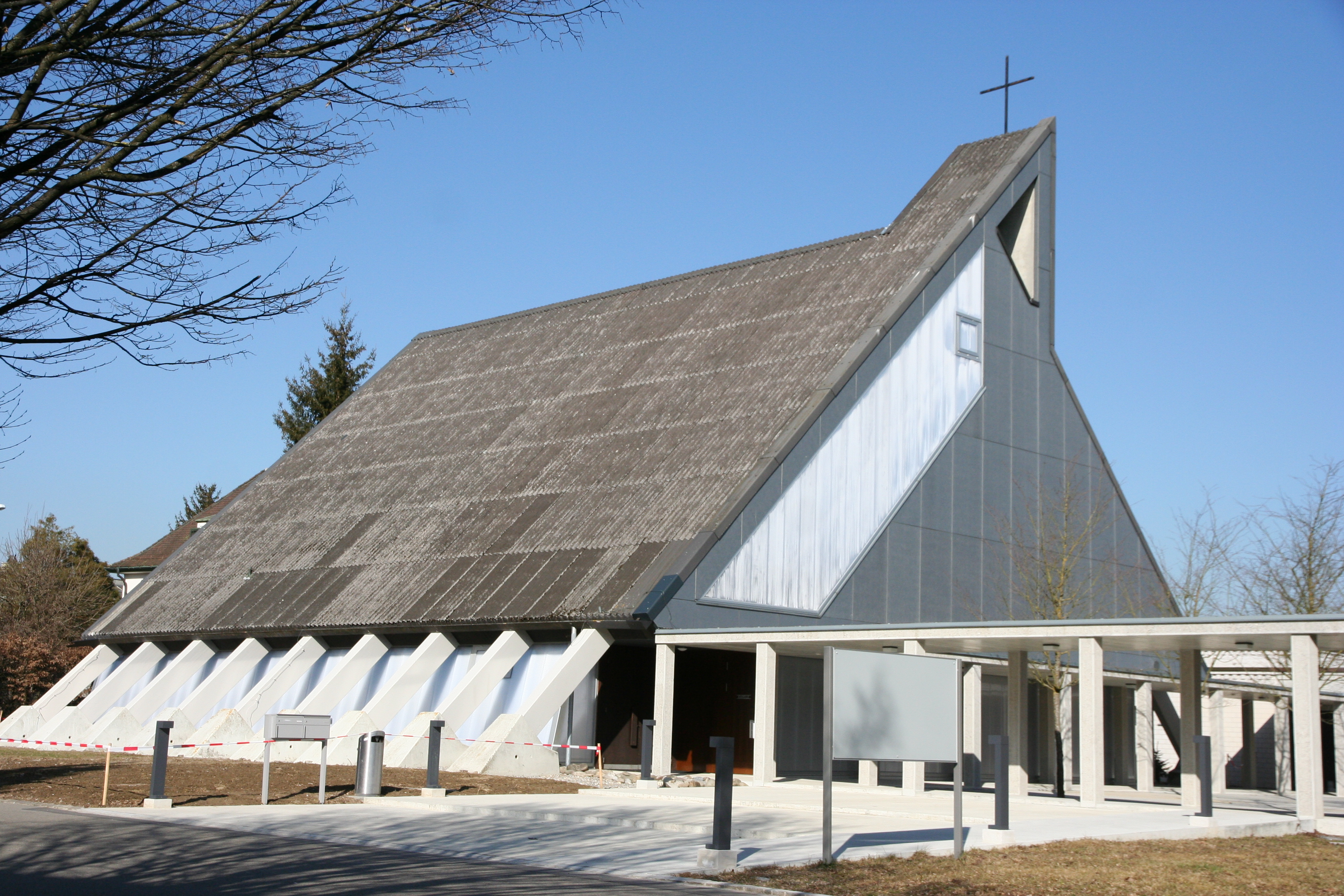 Römisch-katholische Pfarrkirche St. Franziskus Bassersdorf